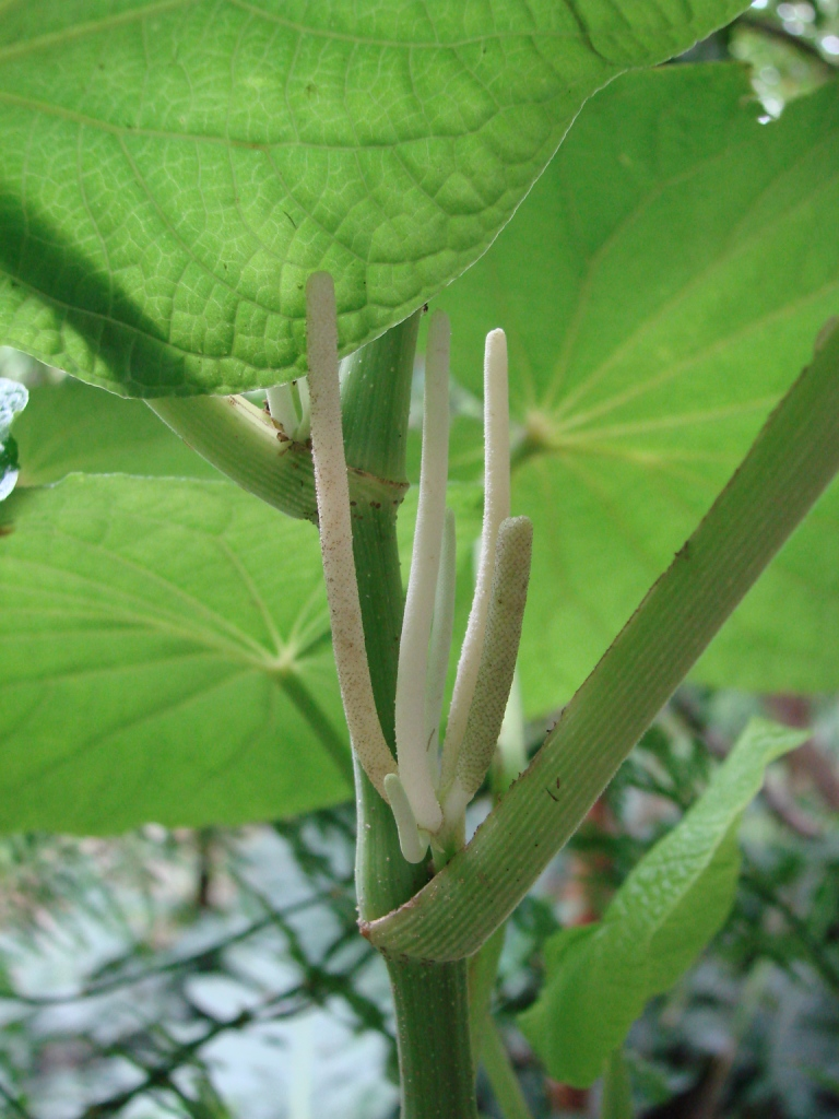 Piper umbellatum L. (Sin: Pothomorphe umbellata) - PIPERACEAE Área de Relevante Interesse Ecológico do Riacho Fundo - Brasília - Distrito Federal - Brasil.